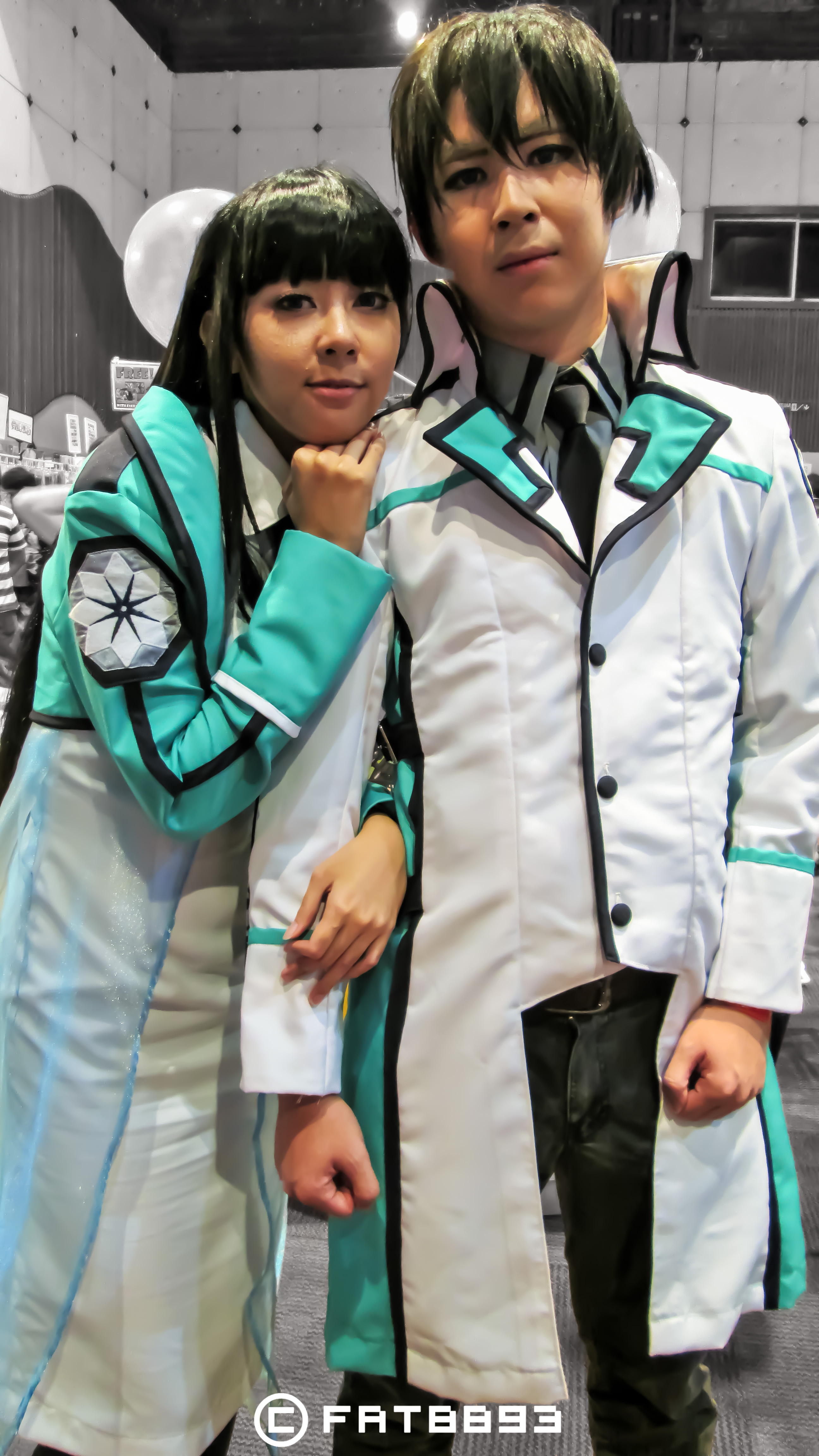 中文（台灣）: AniManGaki 2014，《魔法科高中的劣等生》司波深雪與司波達也cosplayer。